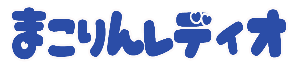 「まこりんレディオ」番組ロゴ